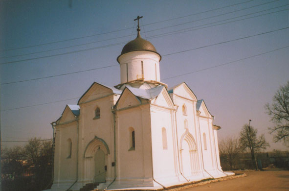 Uspensky Sobor in Klin